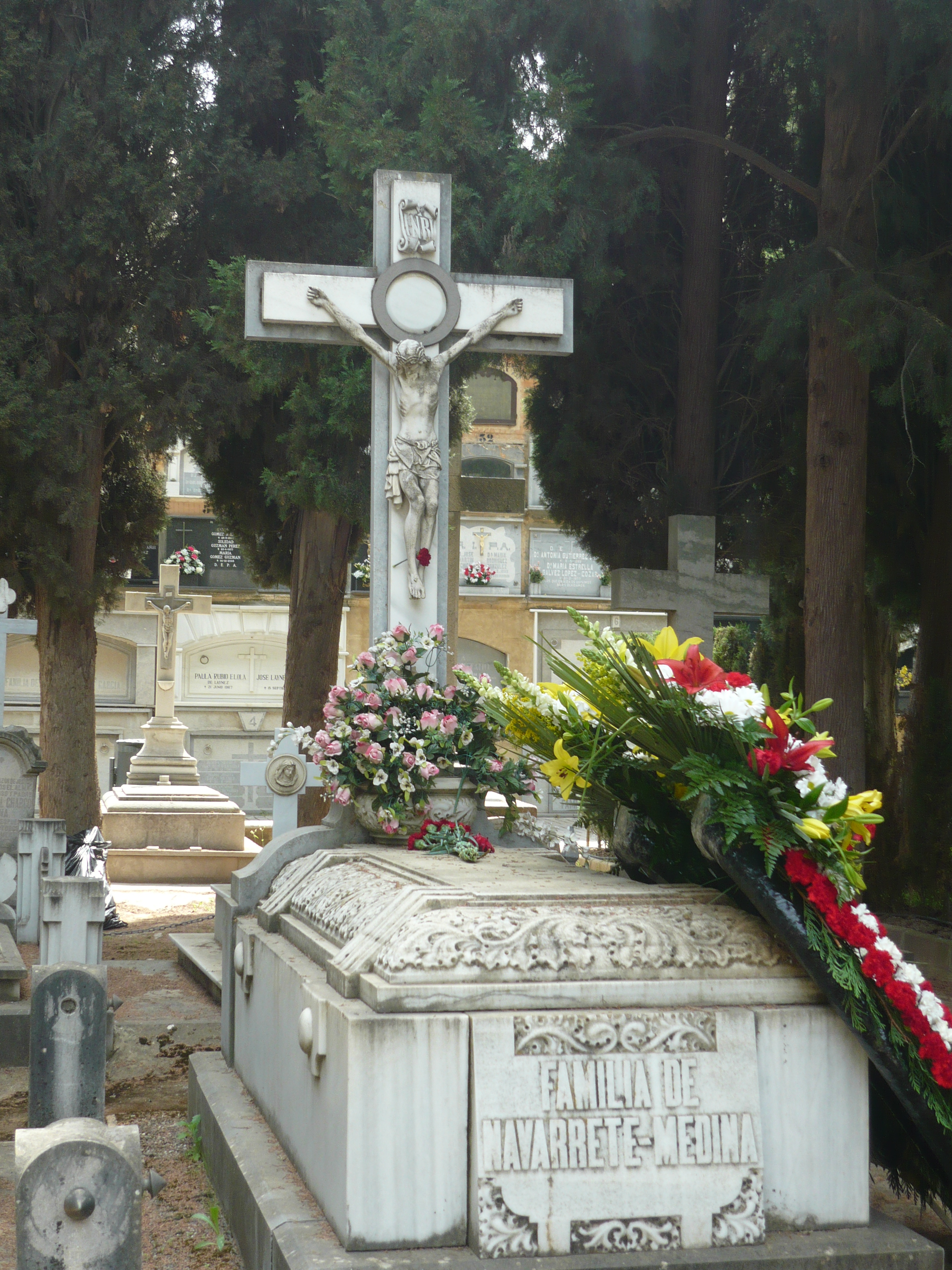 Panteón de la familia Navarrete-Medina, en el patio segundo del cementerio de San José, en Granada (España).